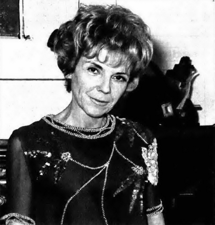 Italian television director Alda Grimaldi